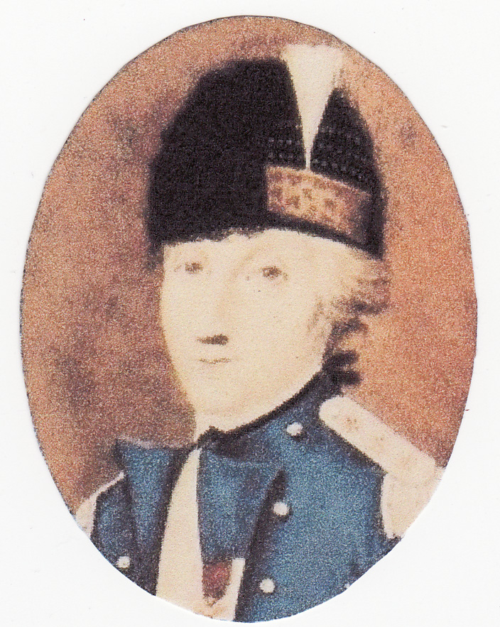 Armand Tuffin de LA Rouërie en uniforme de dragon.